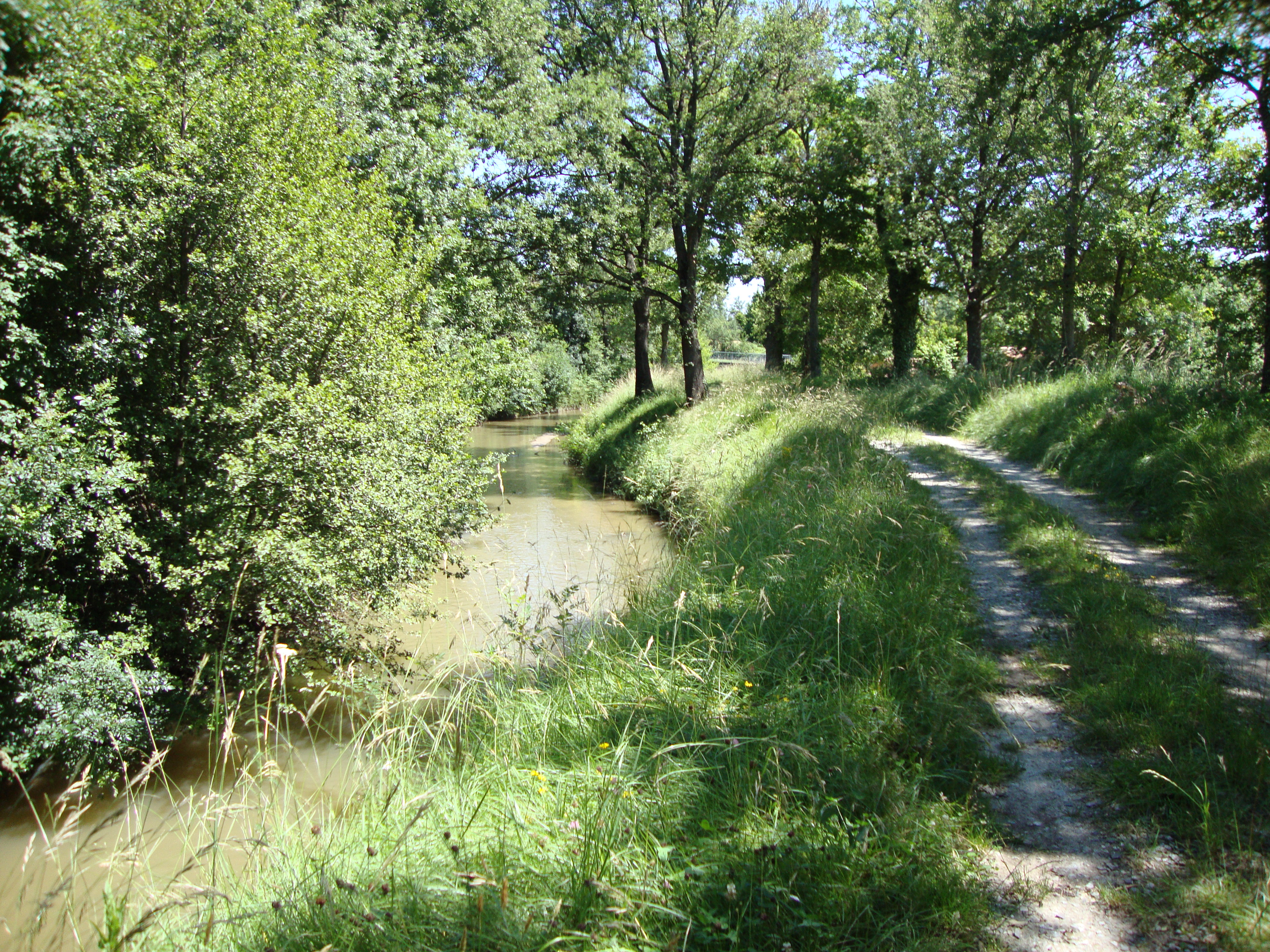 Saint-Paulet (Aude, Fr) La Rigole de la Plaine